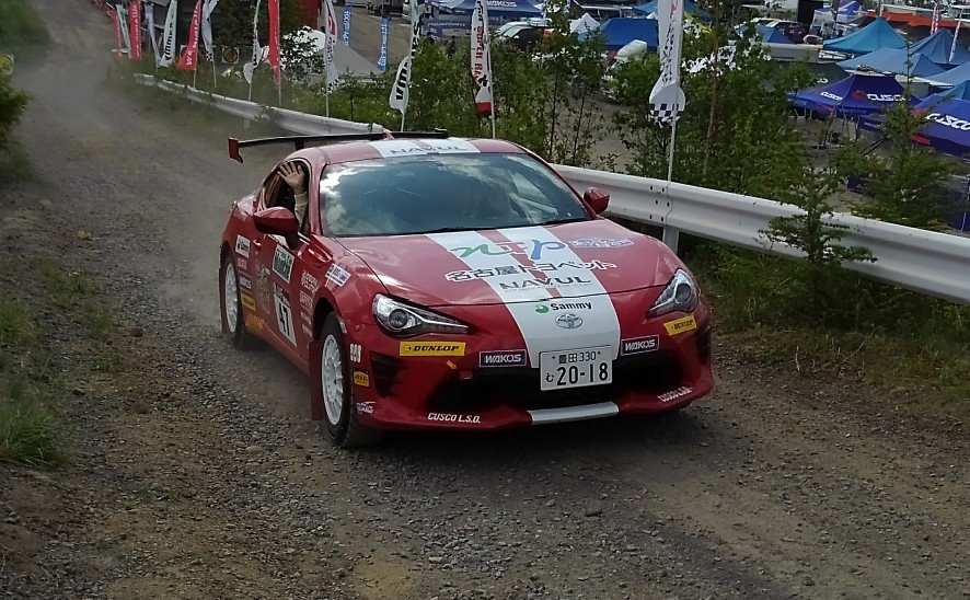 全日本ラリー選手権にて、中村英一/大村啓太のトヨタ・86